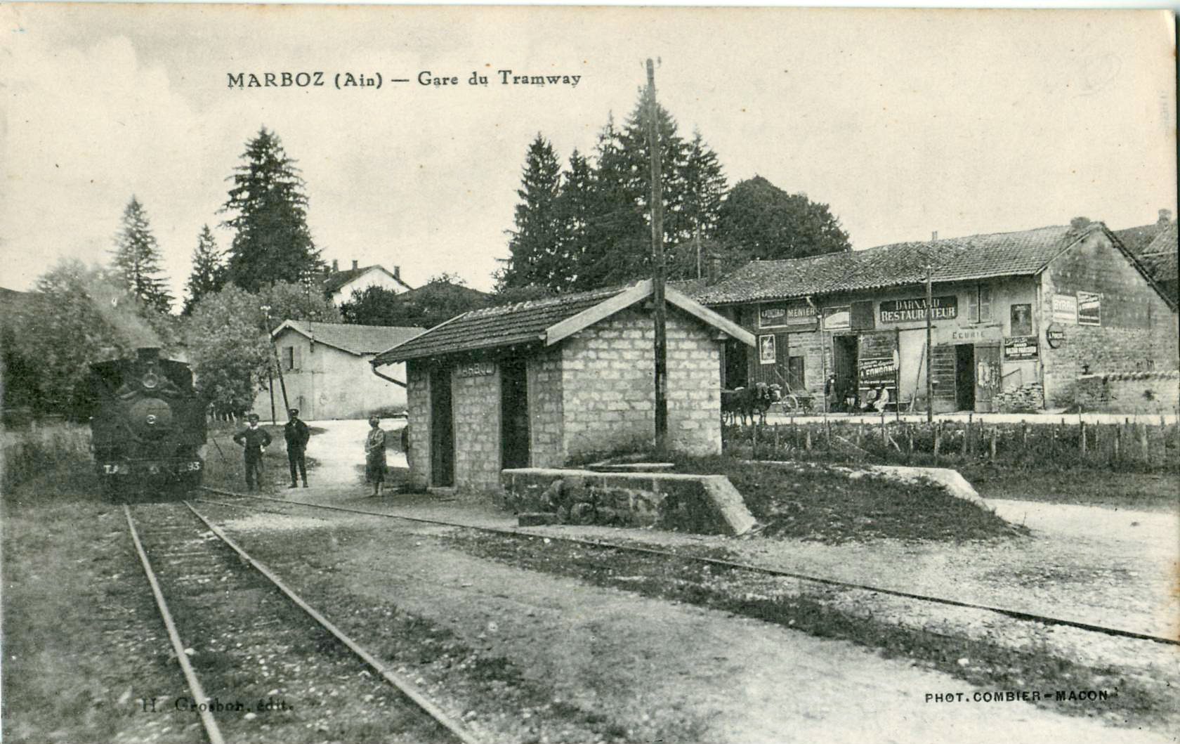 Carte postale ancienne éditée par H. Crosbon & Combier à Macon :MARBOZ - Gare du Tramway